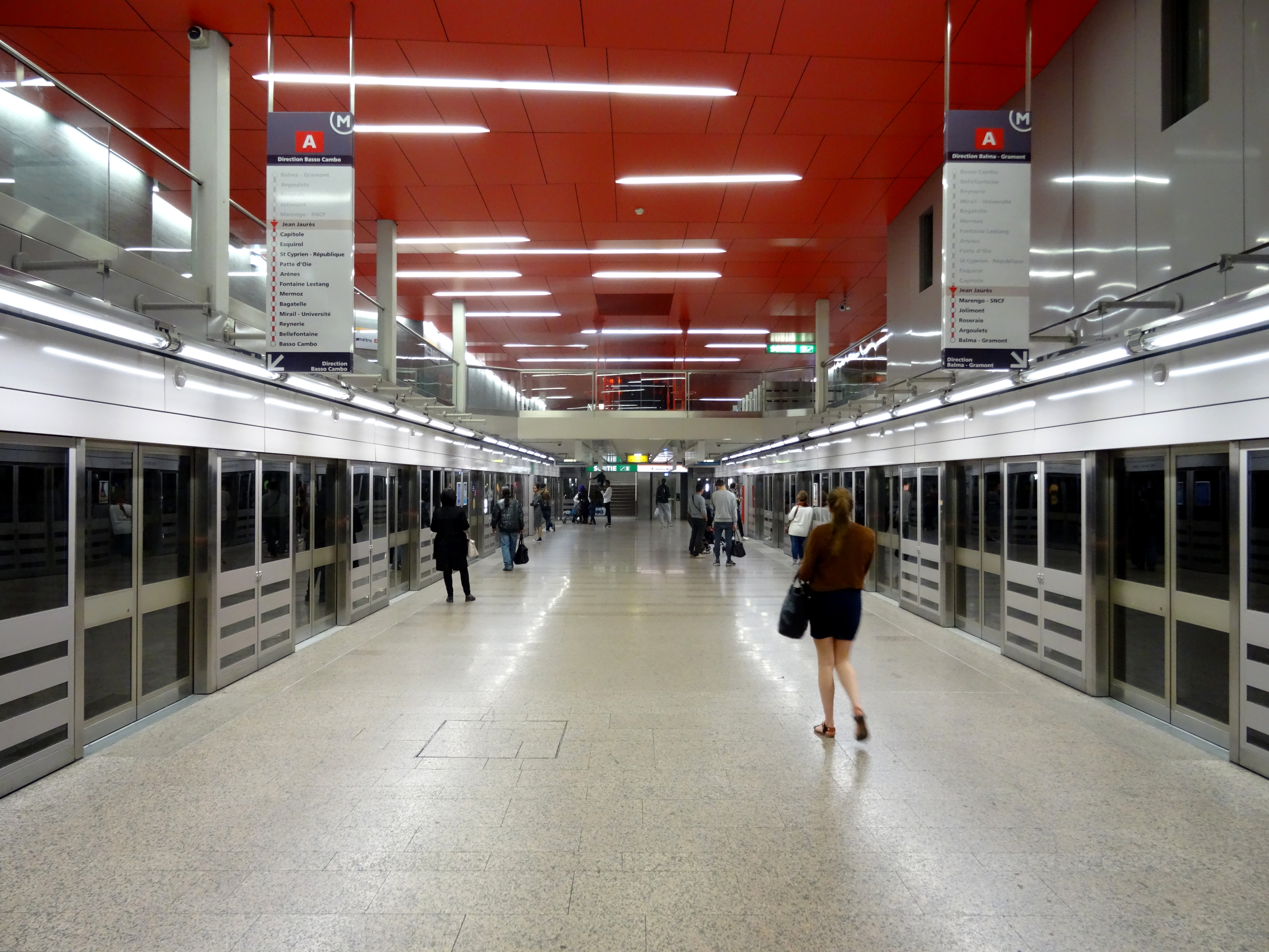 Lgne A + Ligne B